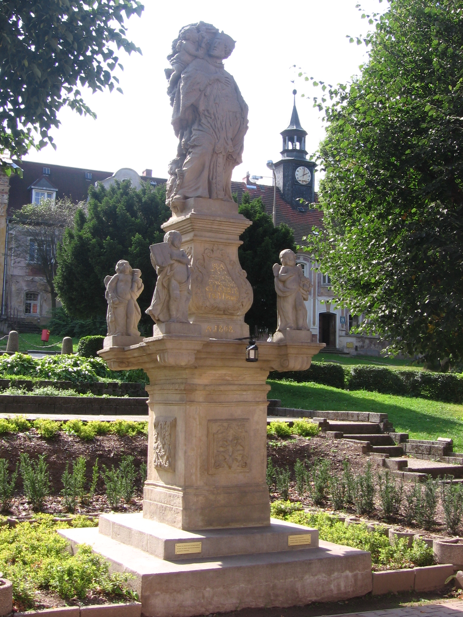 Lewin Kłodzki, figura Jana Nepomucena